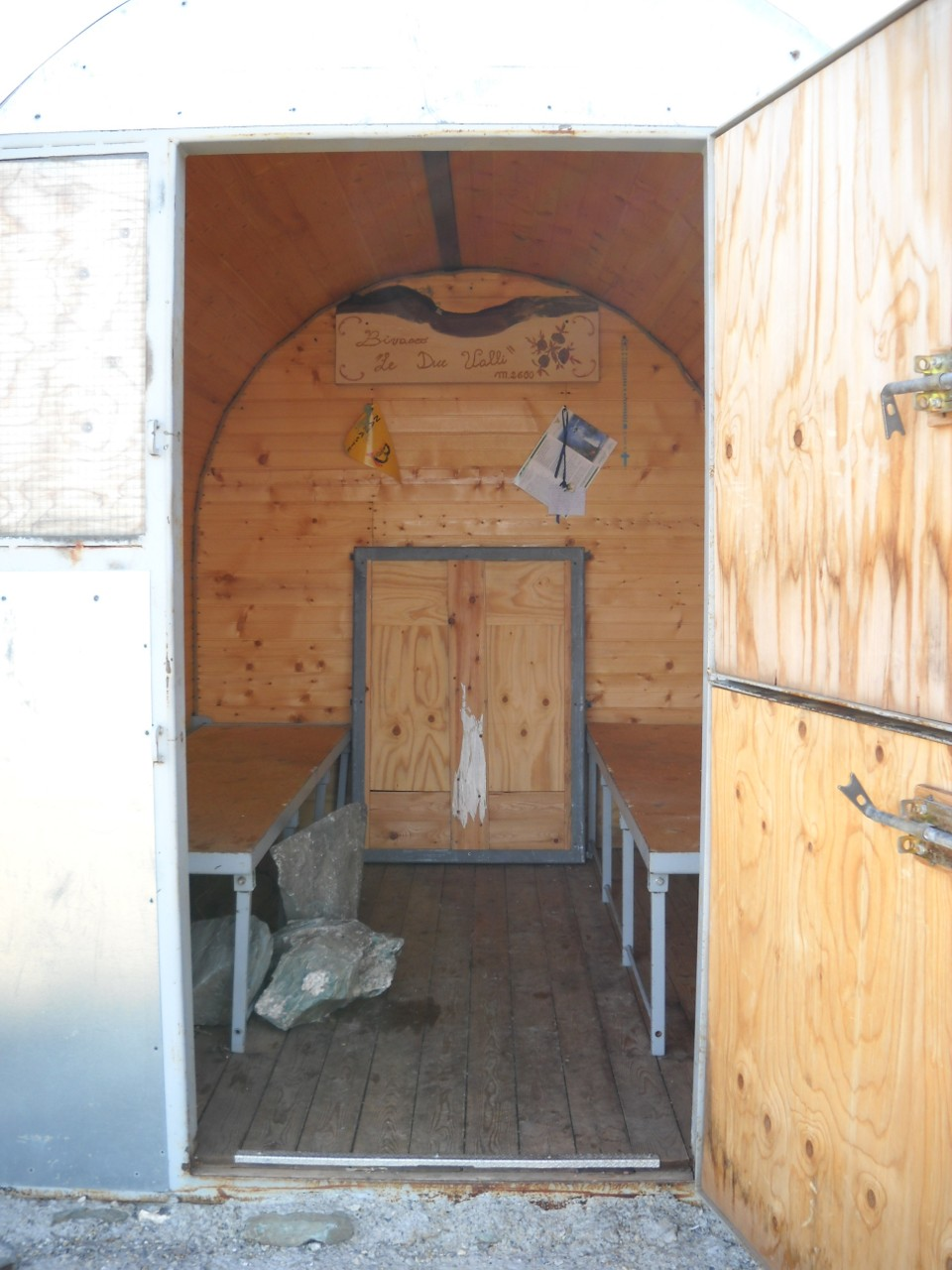 L'interno del bivacco "Le due Valli", tra val Maira e valle Stura di Demonte